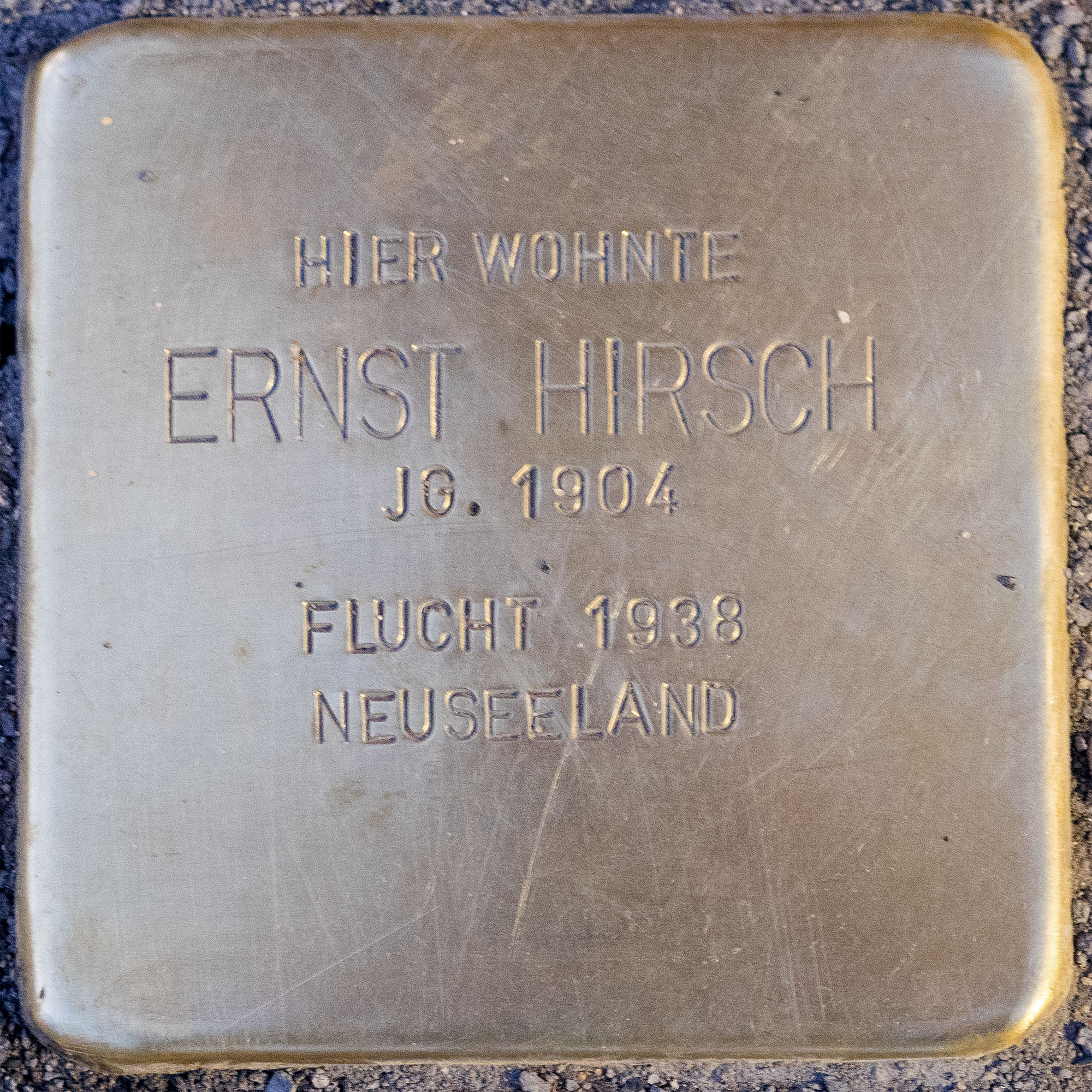 2016 11 25 Stolpersteine Kempen Hirsch Ernst